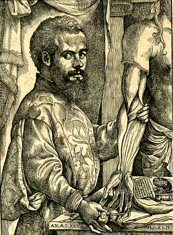 Portrait of Vesalius from his De humani corporis fabrica.label QS:Len,"Portrait of Vesalius from his De humani corporis fabrica."label QS:Les,"Andrés Vesalio (retrato procedente de su obra Fabrica)."